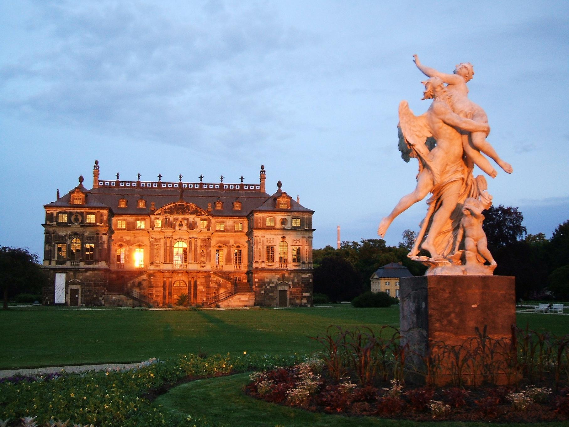 Palais mit Skulptur („Die Zeit entführt die Schönheit“) im Großen Garten in Dresden bei Sonnenuntergang